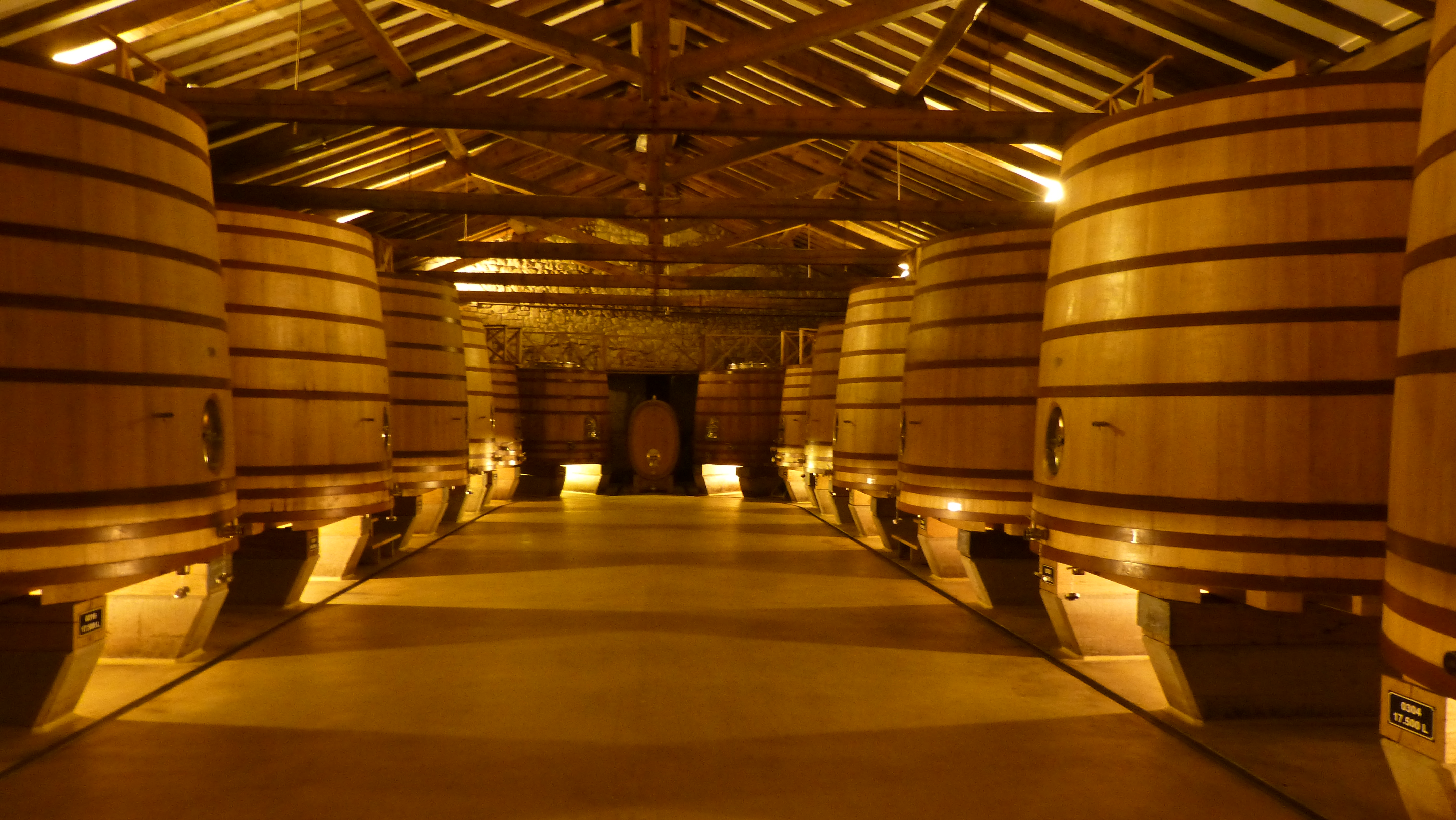 La bodega Imperial. Instalaciones de fermentación de CVNE en Haro La Rioja (España) La bodega Imperial, una bodega autónoma dentro de la gran bodega donde el mosto fermenta en tinas de roble francés y en pequeños depósitos de cemento forrados de cristal.